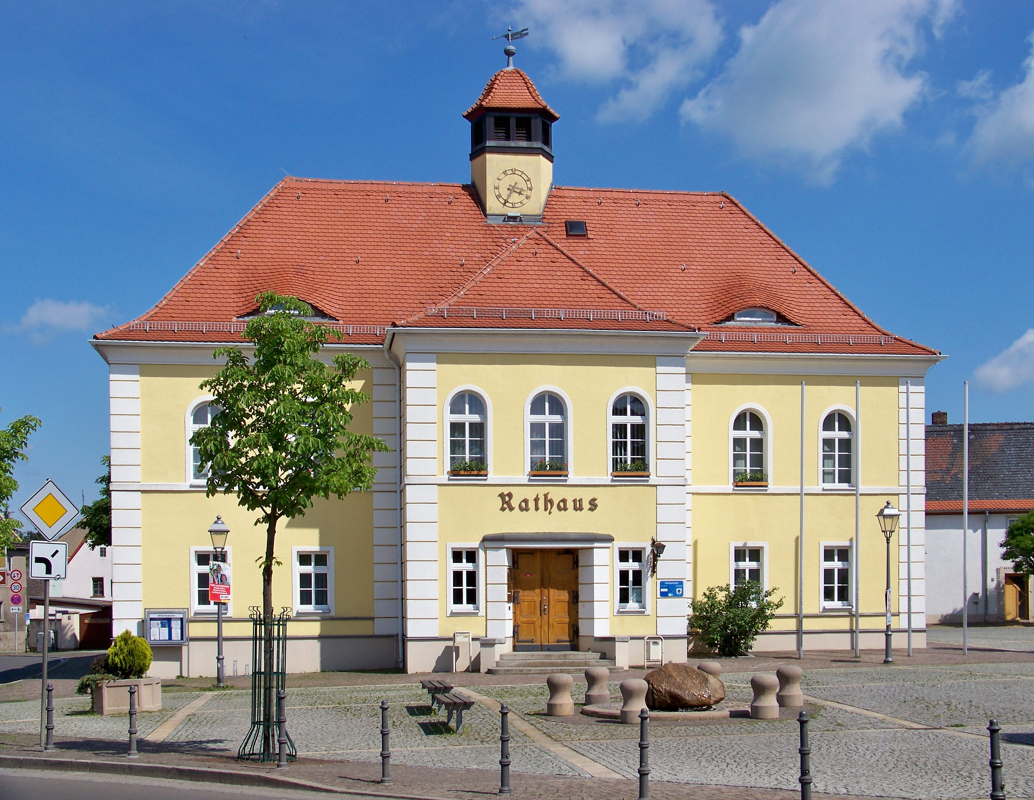 Rathaus im Leipziger Ortsteil Liebertwolkwitz